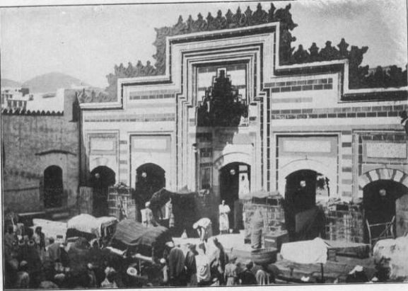 باب الصفا أحد أبواب الحرم المكي -مكة المكرمة en ː Main entrance gate of Haram Sharif in Mecca